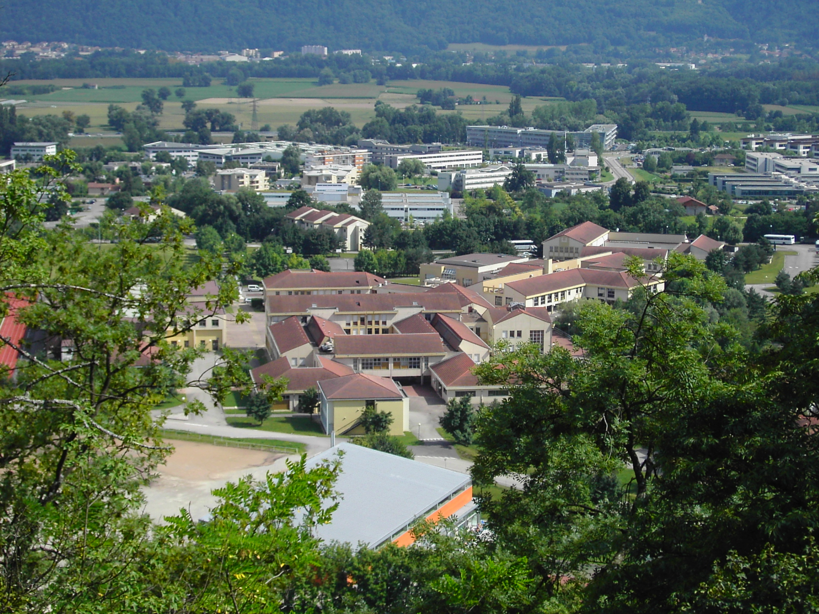 Ecole des pupilles de l'air vue depuis le parc de la mairie de Montbonnot